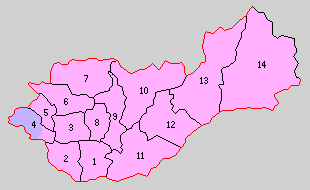 京都府何鹿郡の町村制時点の町村。